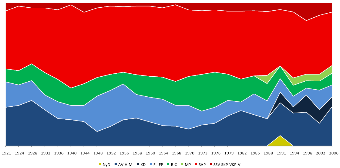 Proportion des partis politique dans le Riksdag (1944-2006)